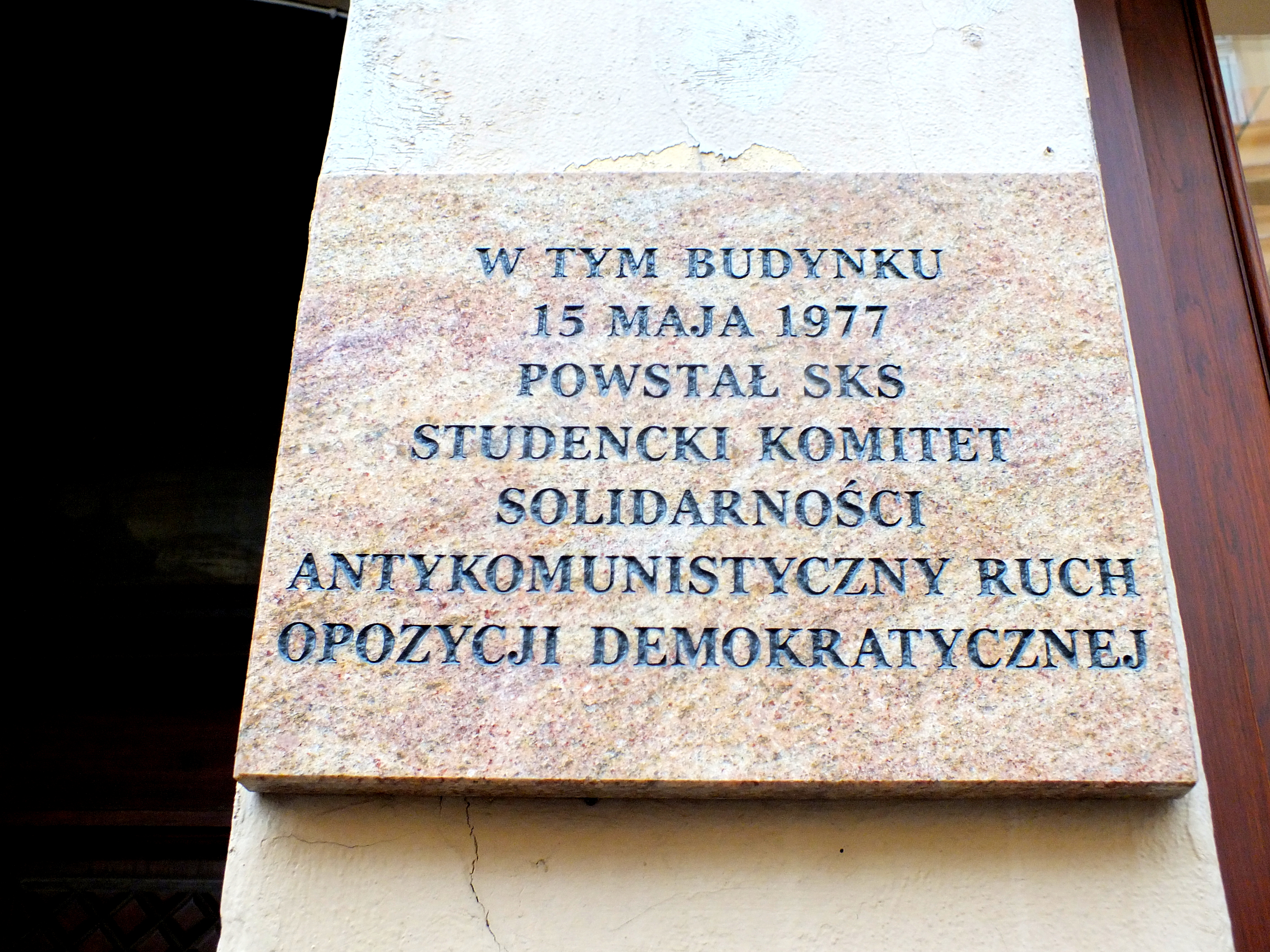 Studencki Komitet Solidarności. Kraków, ul. Grodzka 27